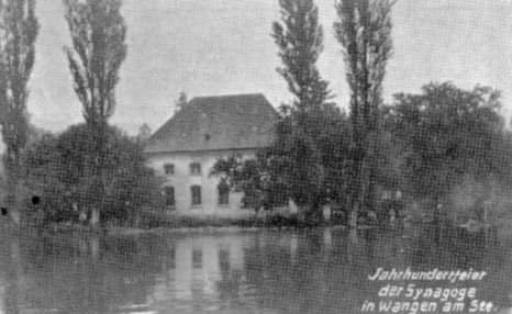 Synagoge von Wangen (Öhningen), zeitgenössische Ansichtskarte, um 1920.